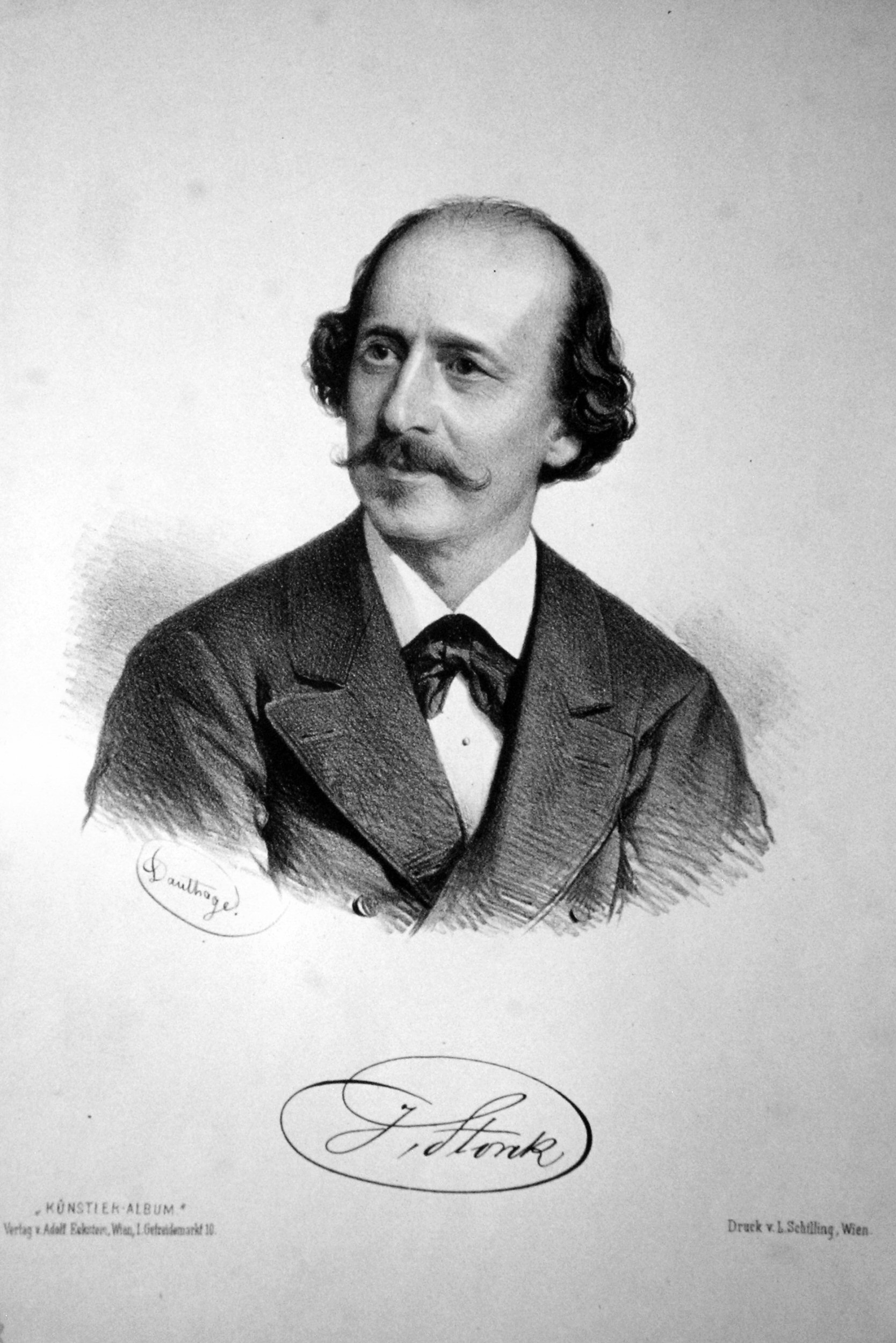 Josef von Storck (1830-1902), österreichischer Maler, Direktor des Kunstgewerbemuseums in Wien. Lithographie von Adolf Dauthage, ca. 1880